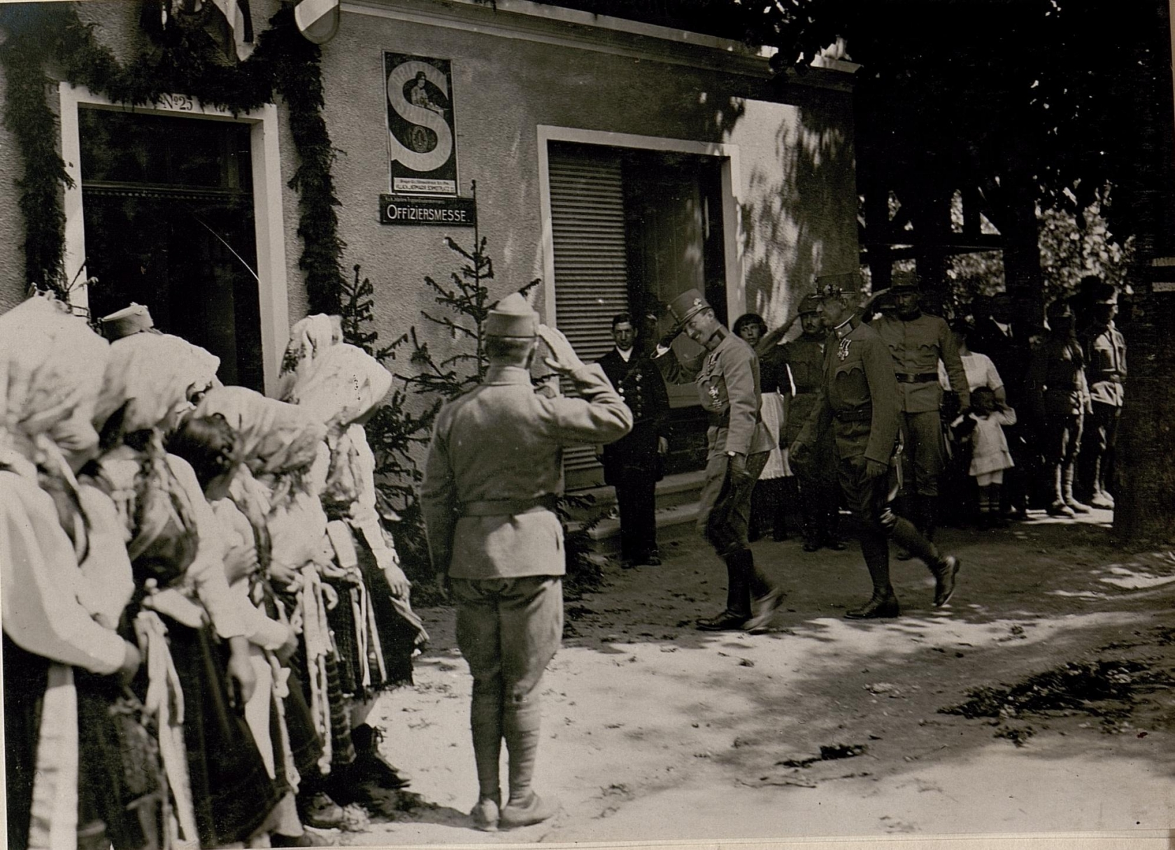 Besuch Ihrer Majestäten in Hermagor: Sr.Majestät begibt sich in die Offiziersmesse. (4/6.1917.)